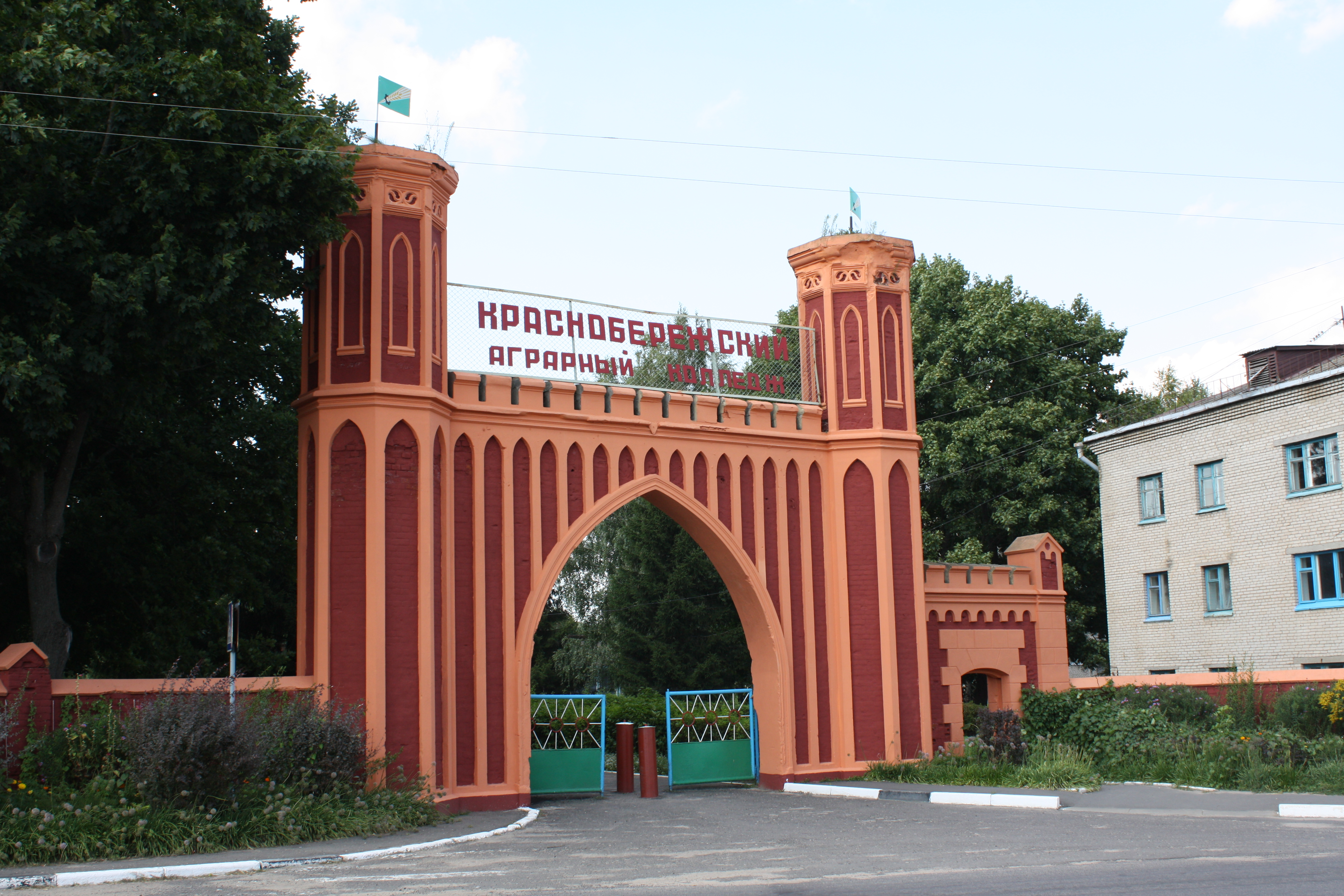 Беларуская (тарашкевіца): Палацава-паркавы комплекс Козелаў-Паклеўскіх. в. Красны Бераг This is a photo of Belarusian heritage monument. Reference number: 312Г000324 ( WLM)